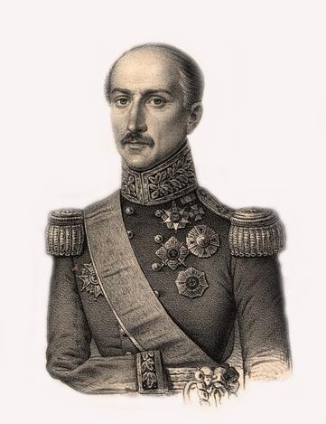 Bernardo de Sá Nogueira de Figueiredo (1795-1876), marquês de Sá da Bandeira, político português.